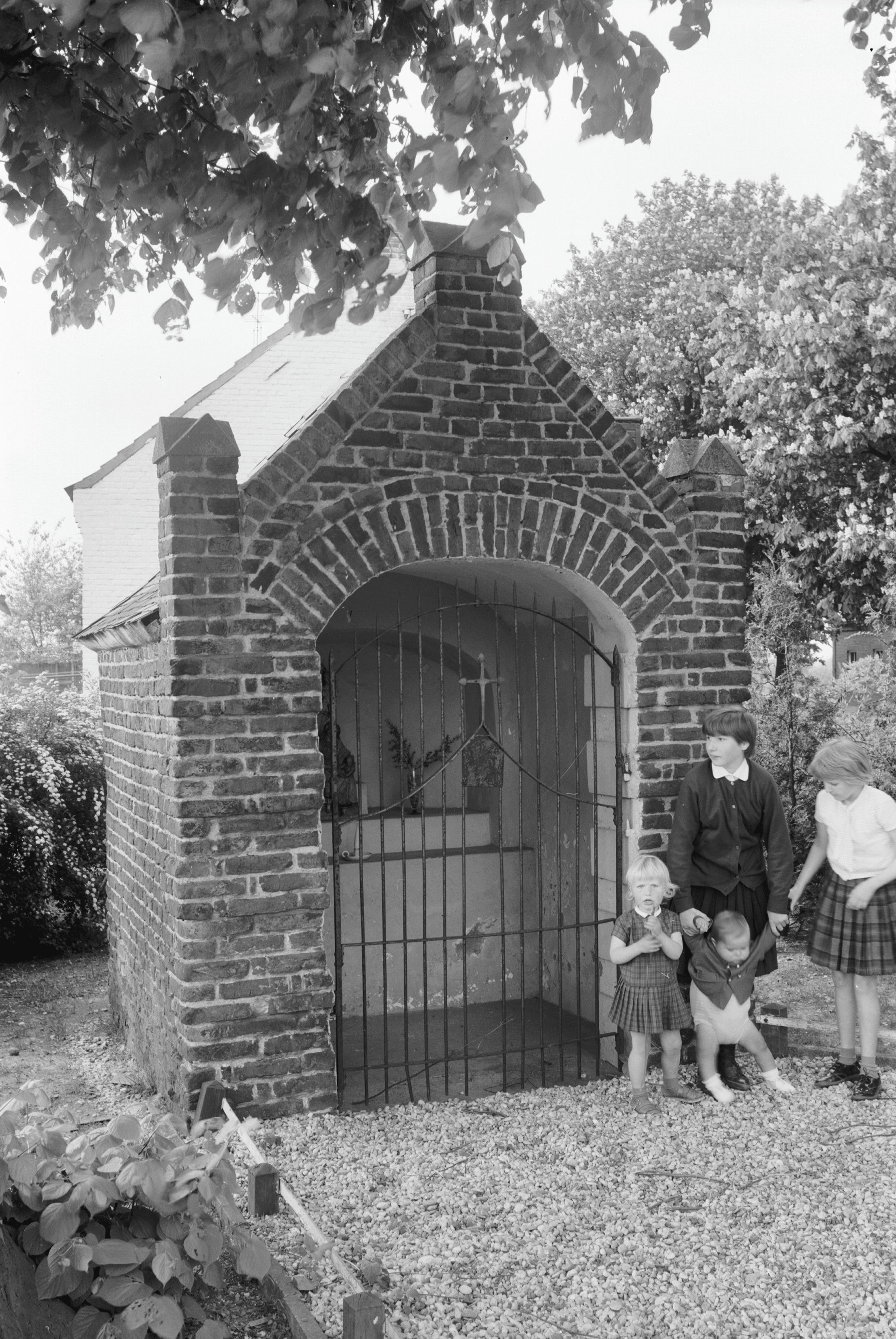 Sint Annakapel: Bakstenen wegkapel met tuitgevel, groepje kinderen op de voorgrond